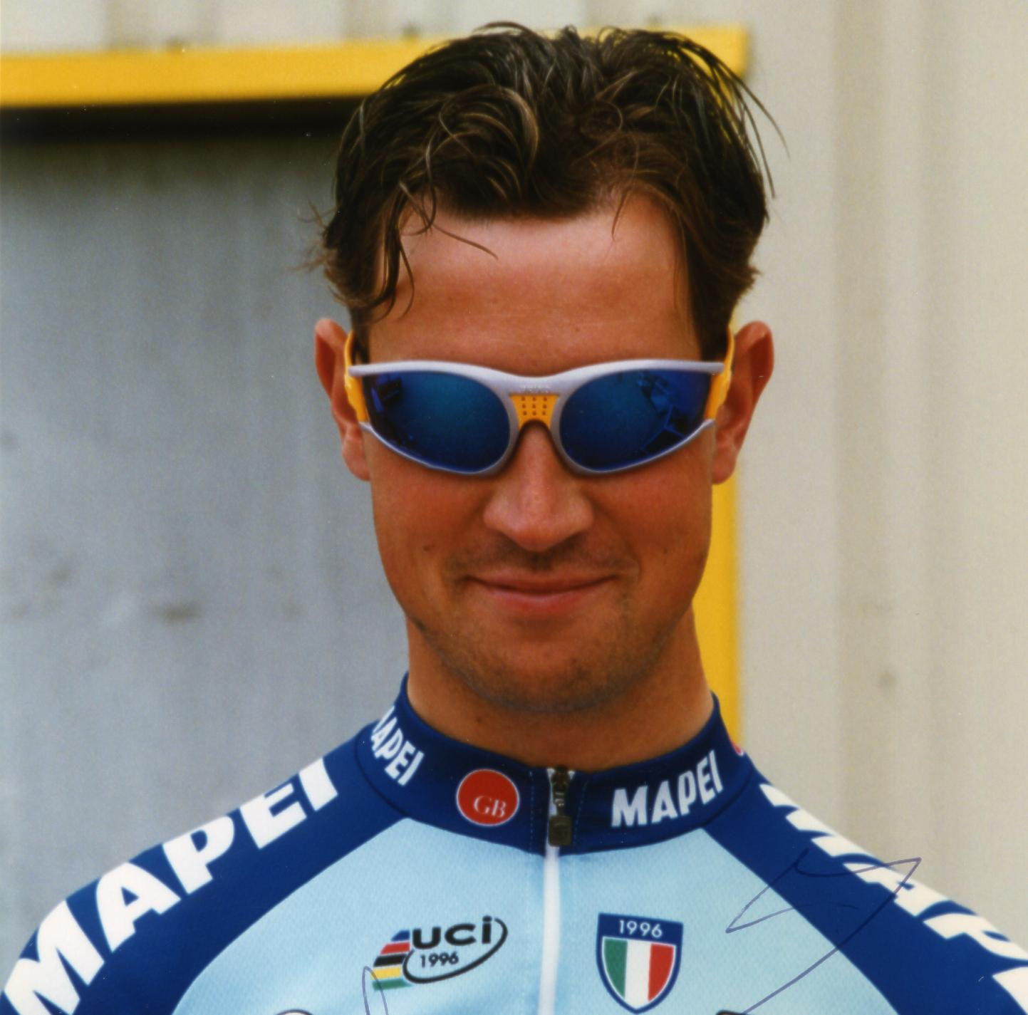 CRITERIUM DE LEVES 1997